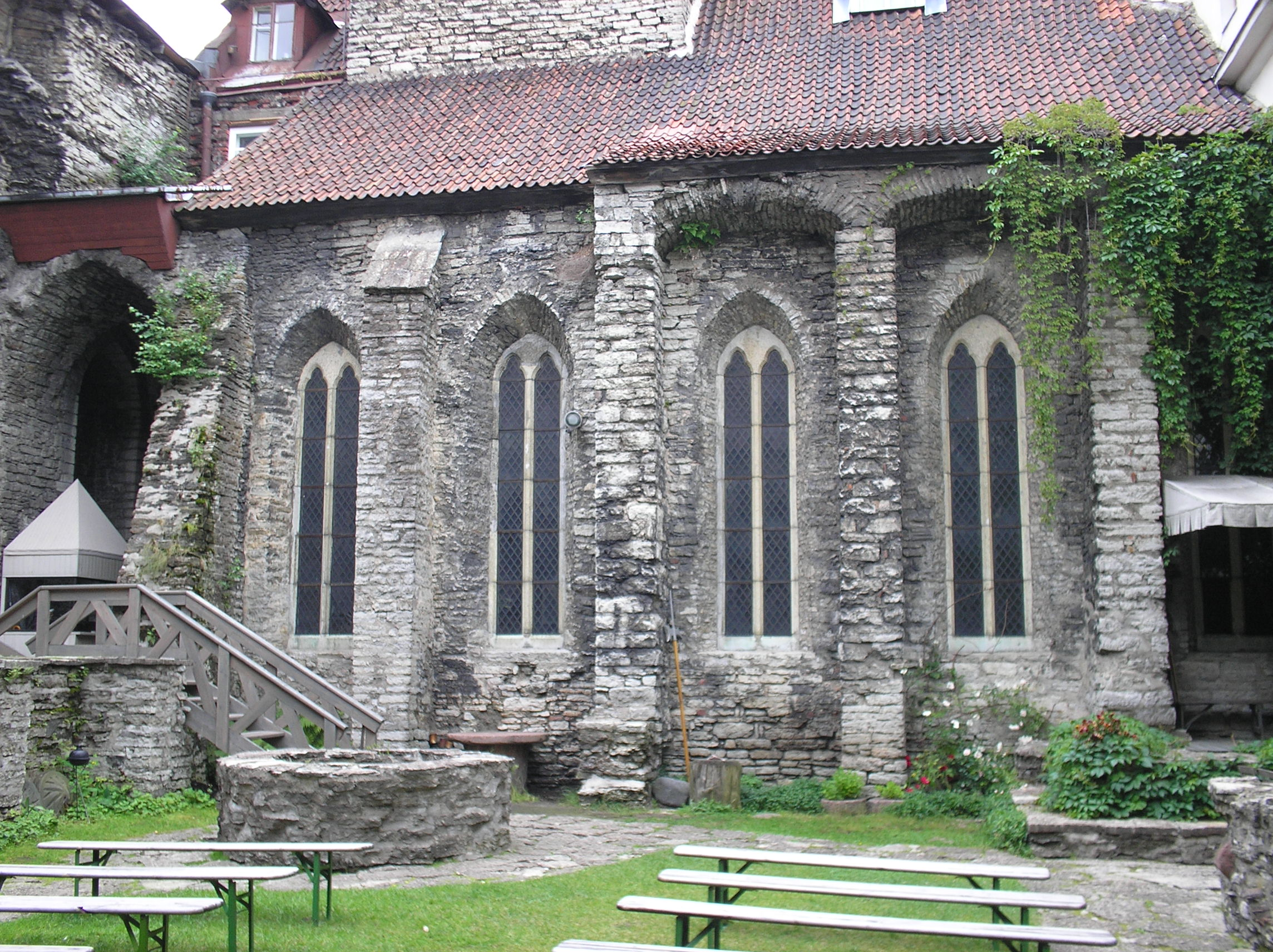 Dominiiklaste kloostri hoov